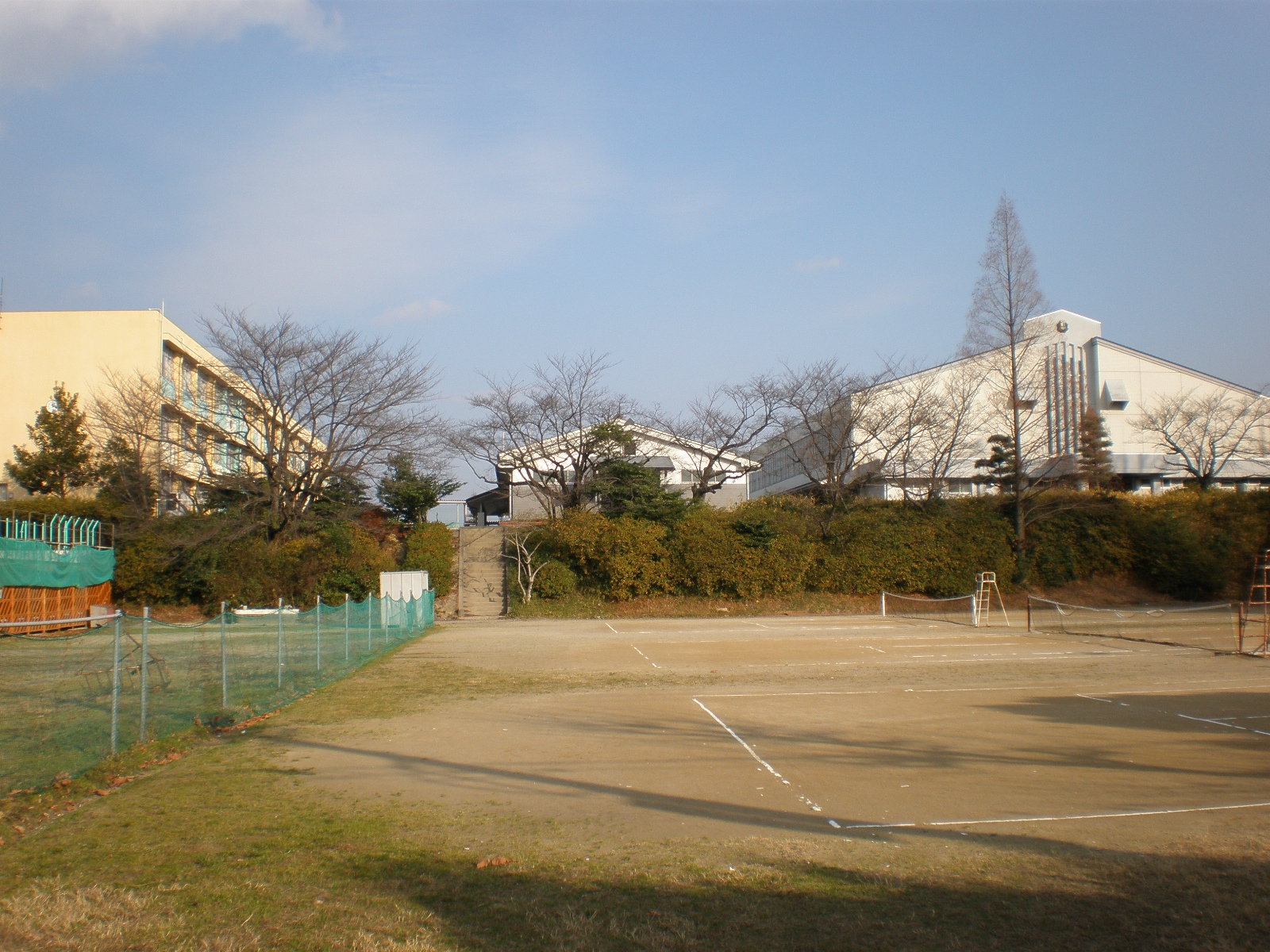 愛知県小牧市にある篠岡中学校